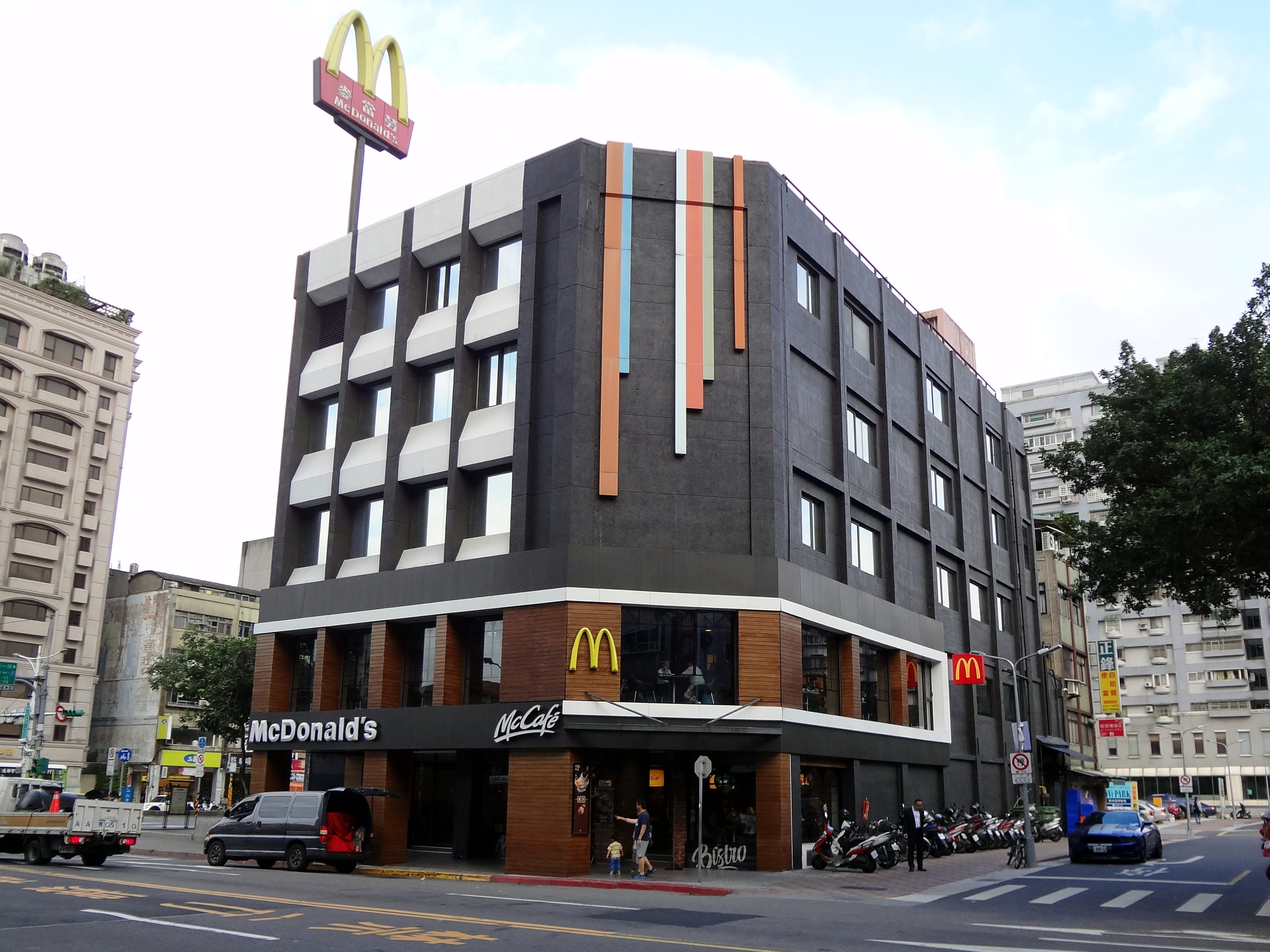 臺灣麥當勞餐廳林森二店，位於臺北市中正區林森南路1號，也是臺灣麥當勞餐廳總部。